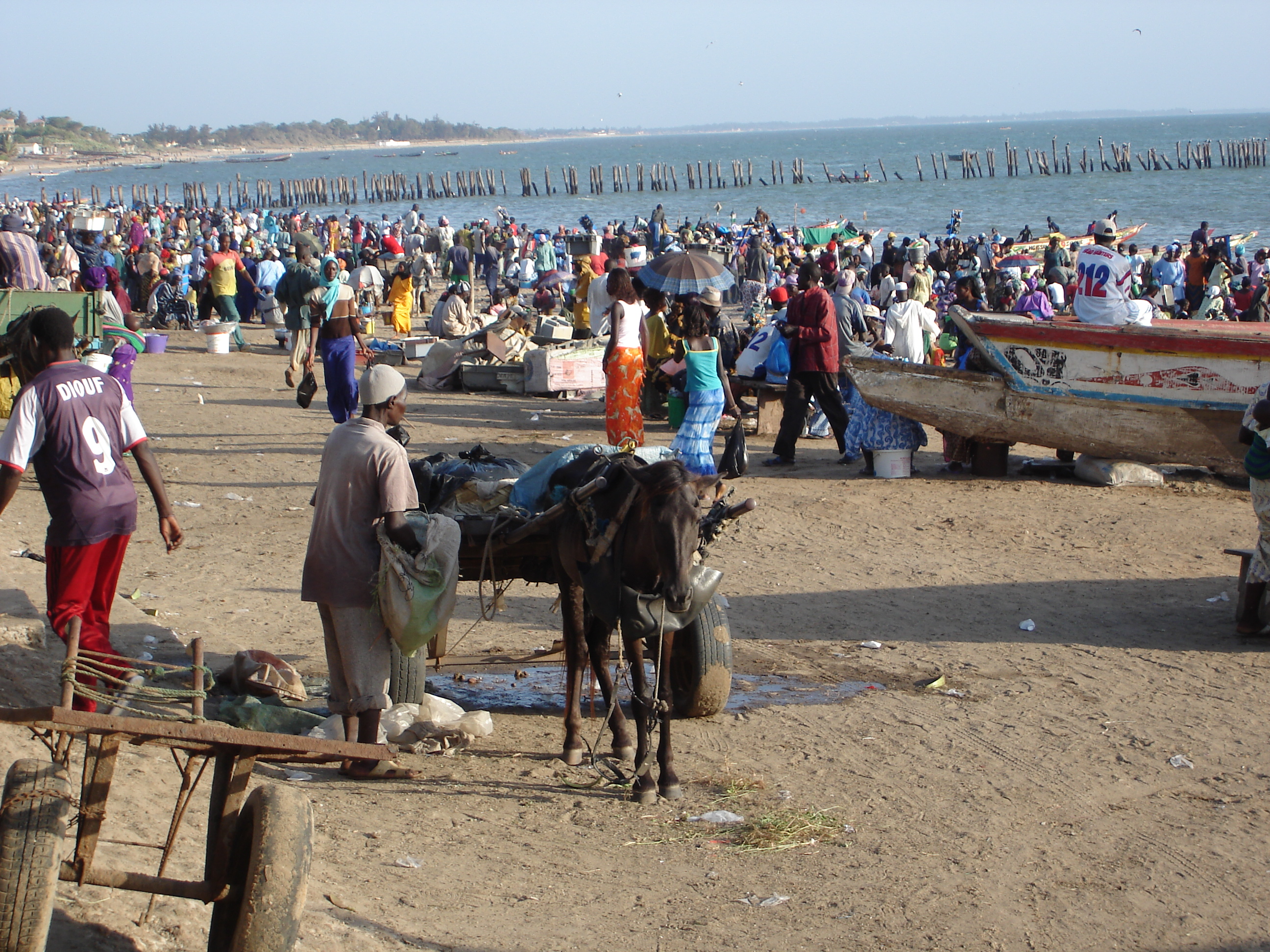 Arrivée des pêcheurs à M'BOUR Octobre 2007